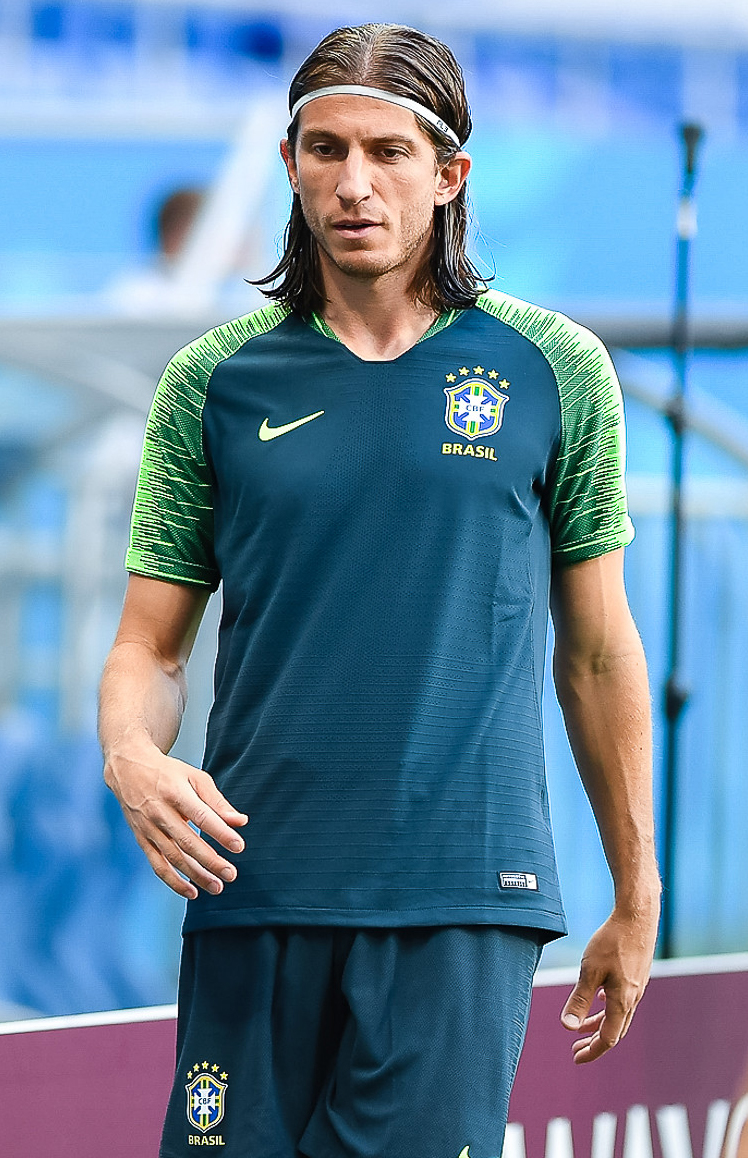 Бразилия и Швейцария готовятся к очной встрече на «Ростов Арене»